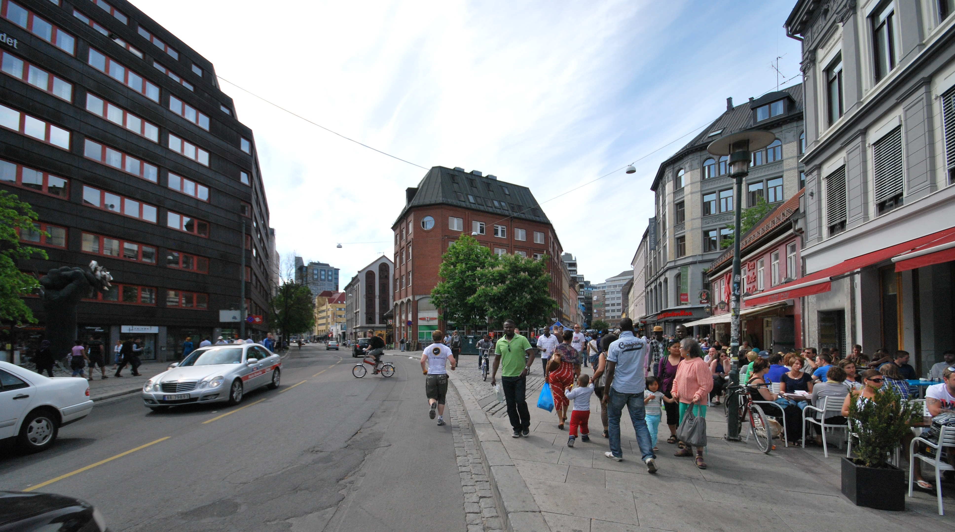 Lilletorget, Vaterland, Oslo, sett fra Brugata mot vest. Stenersgata til venstrer, Brugata til høyre